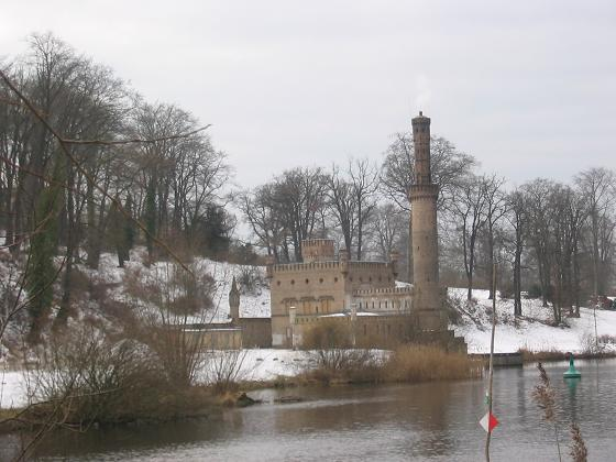 Glienicker Lake, Berlin-Potsdam, Blick von Klein Glienicke auf das Dampfmaschinenhaus im Park Babelsberg